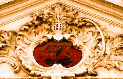 Das Wolpmann’sche Haus, Detail: Wappenkartusche